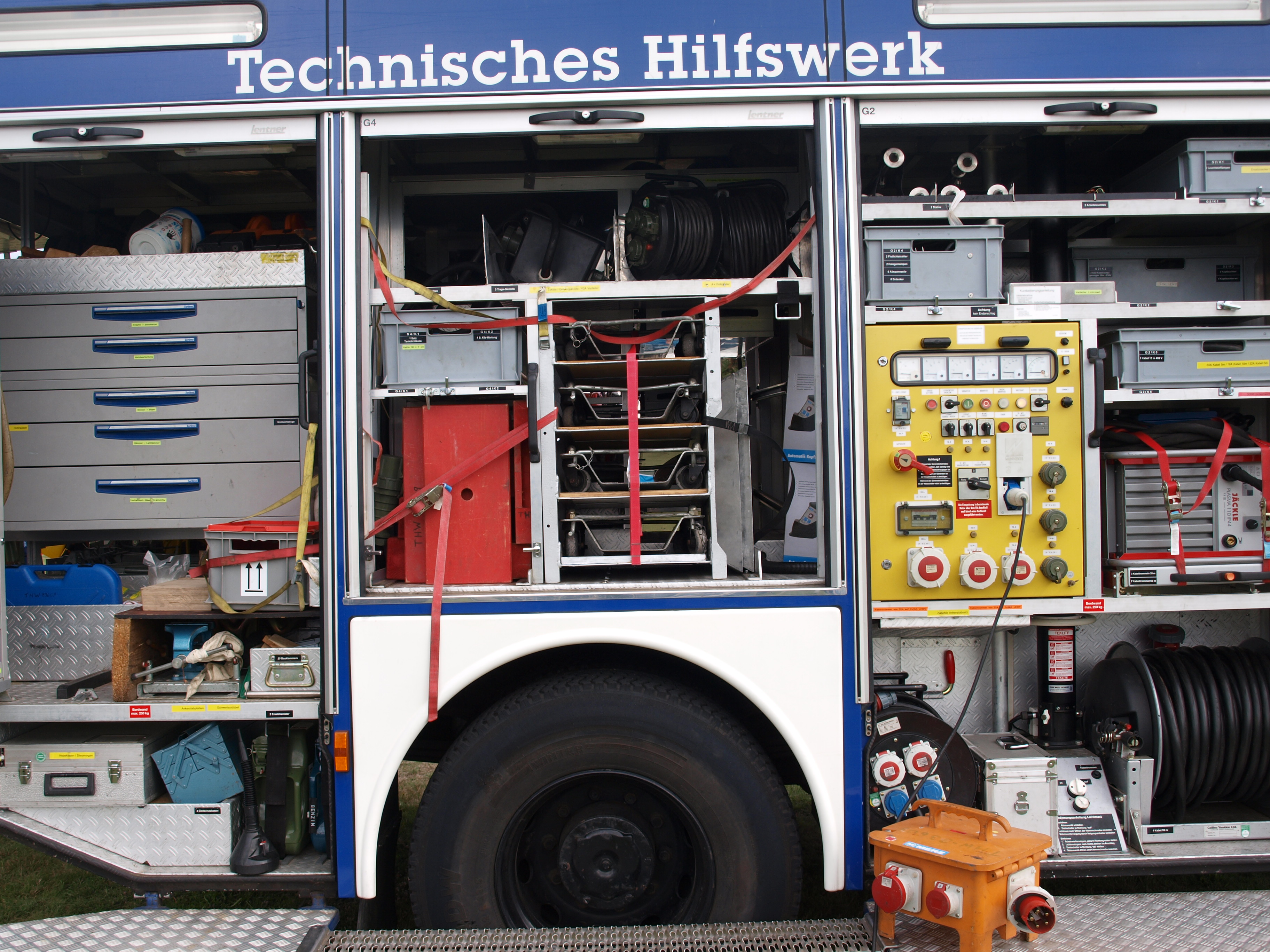 "Innenleben" eines Gerätekraftwagens auf dem Flugplatz Gatow